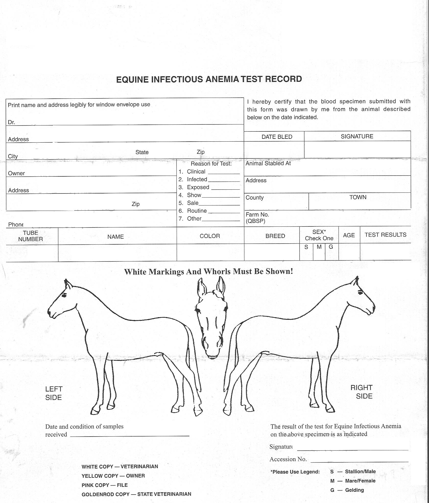 Equine Infectious Anemia Test Sheet (Coggins test)